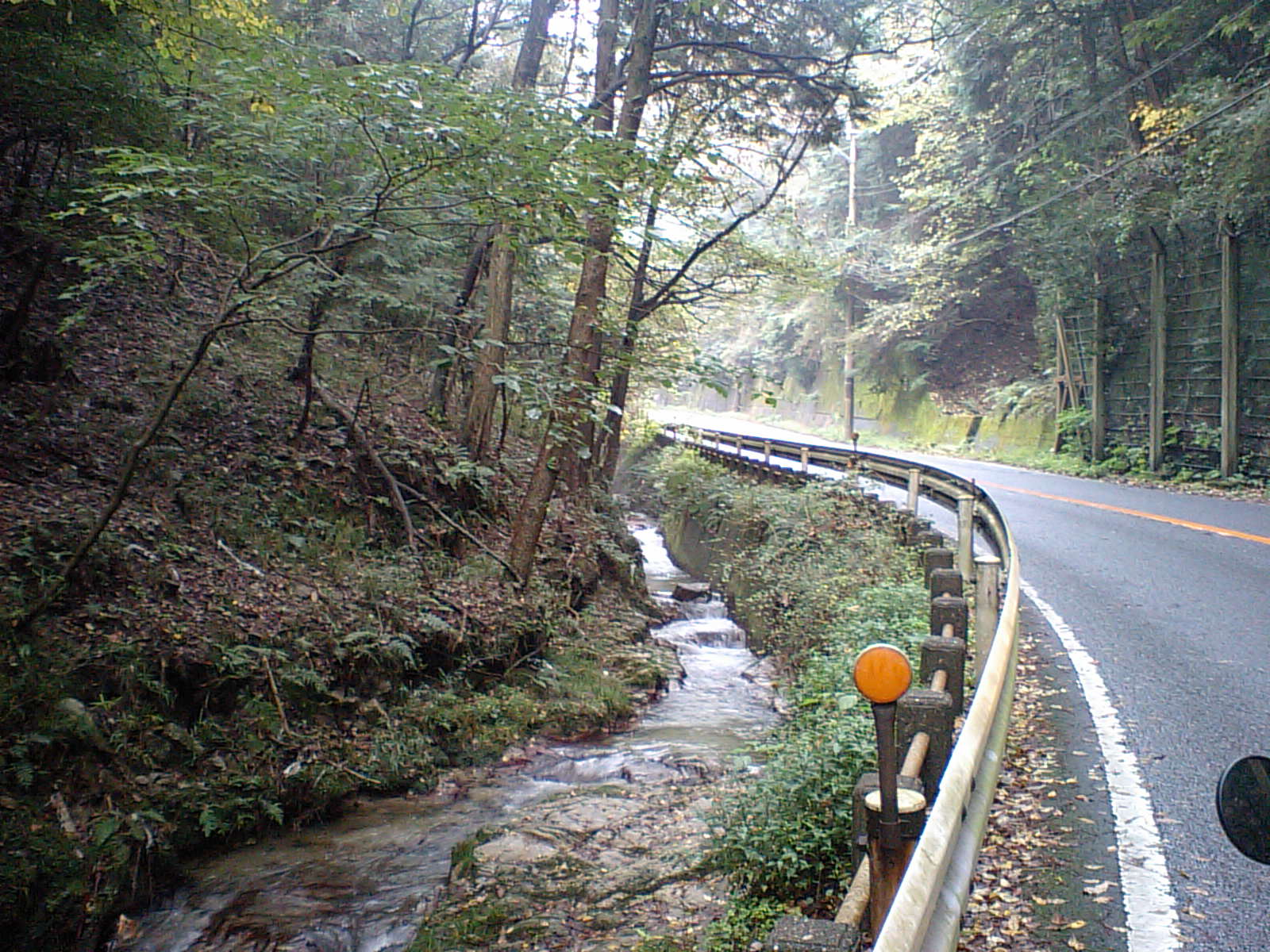 京都市左京区北白川、志賀越道(山中越) 2011、秋